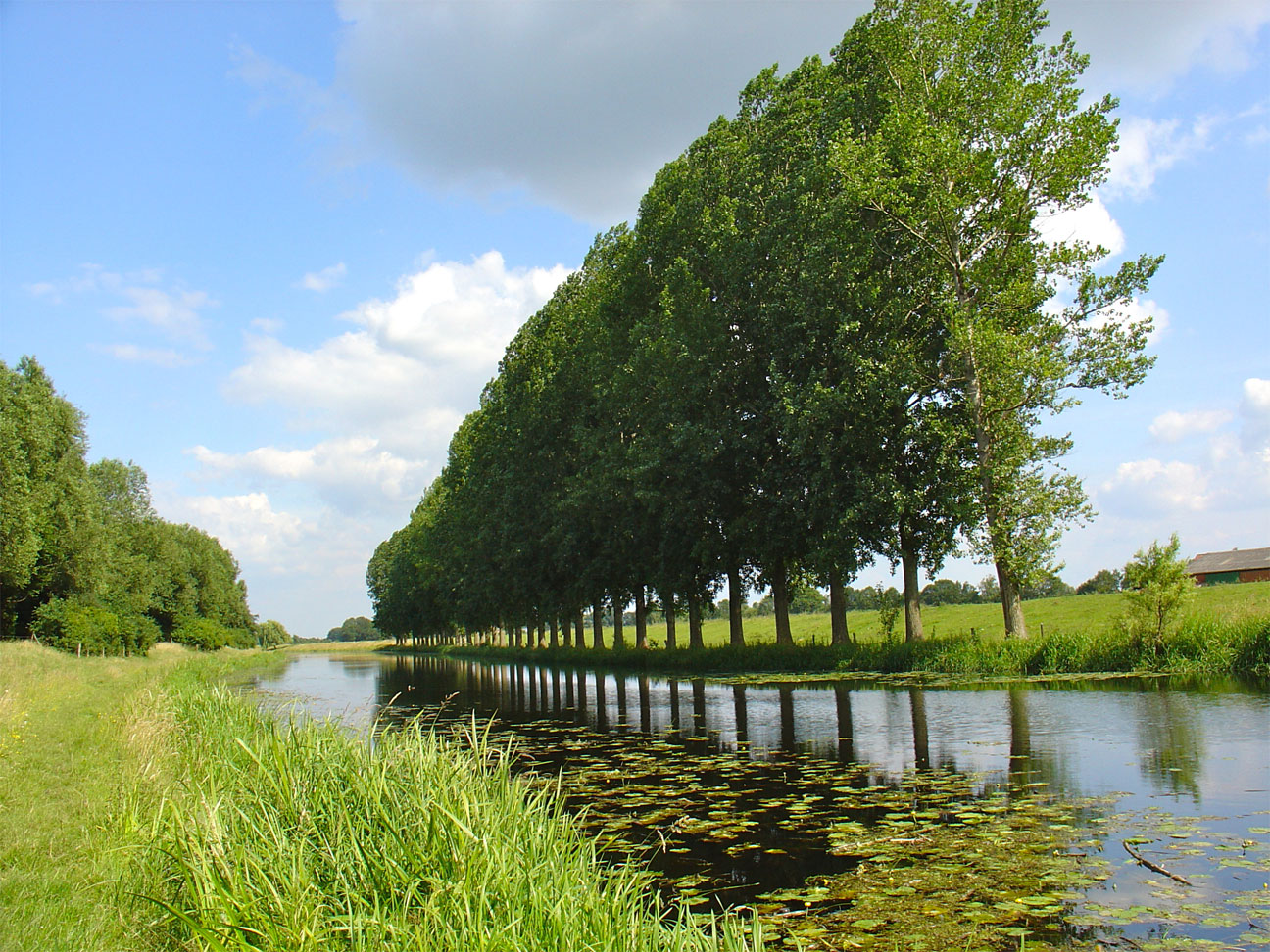 Bocholter Aa of Aa Strang (Isselburg)